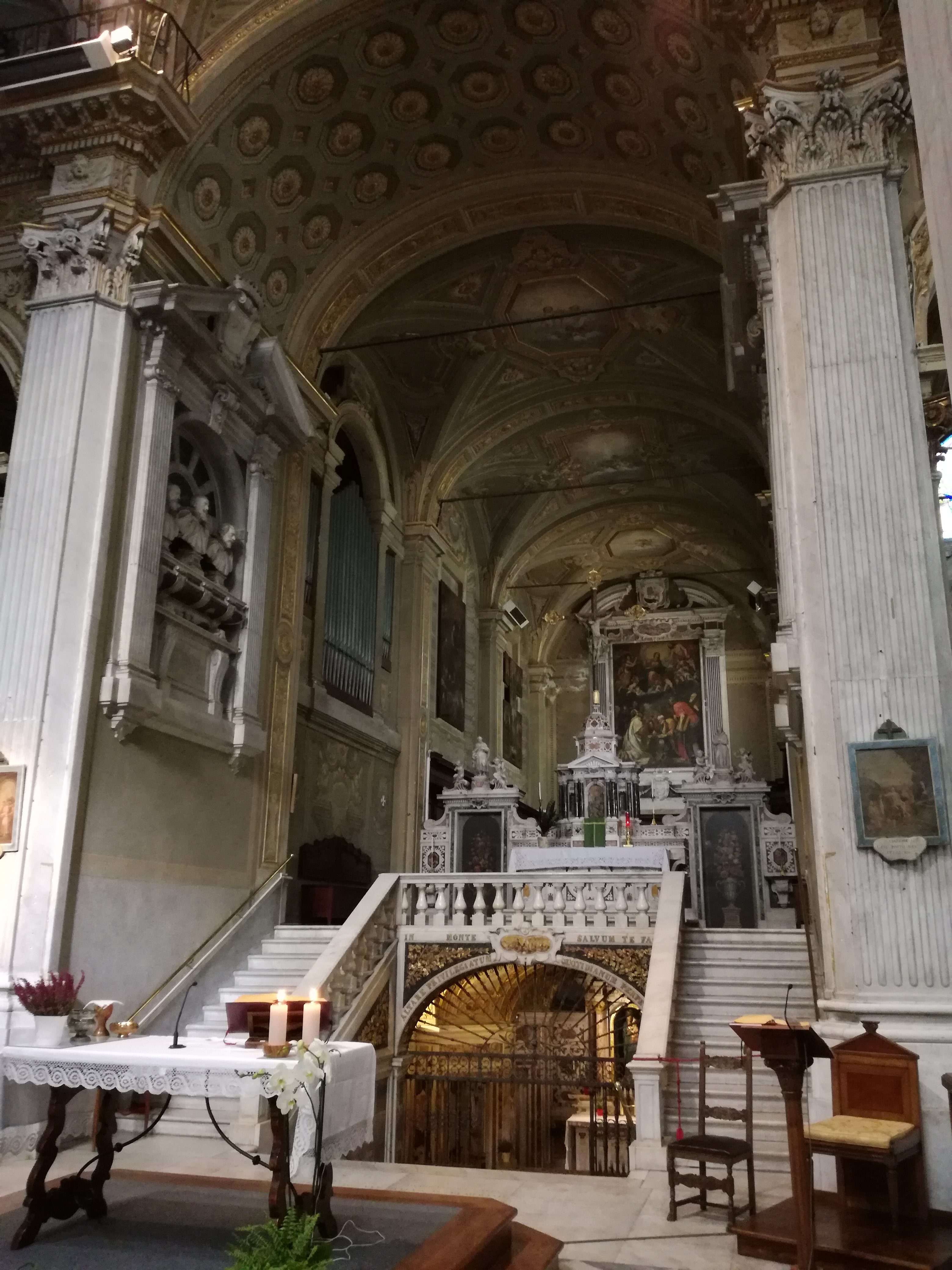 Nostra Signora del Monte (Genova), altare maggiore